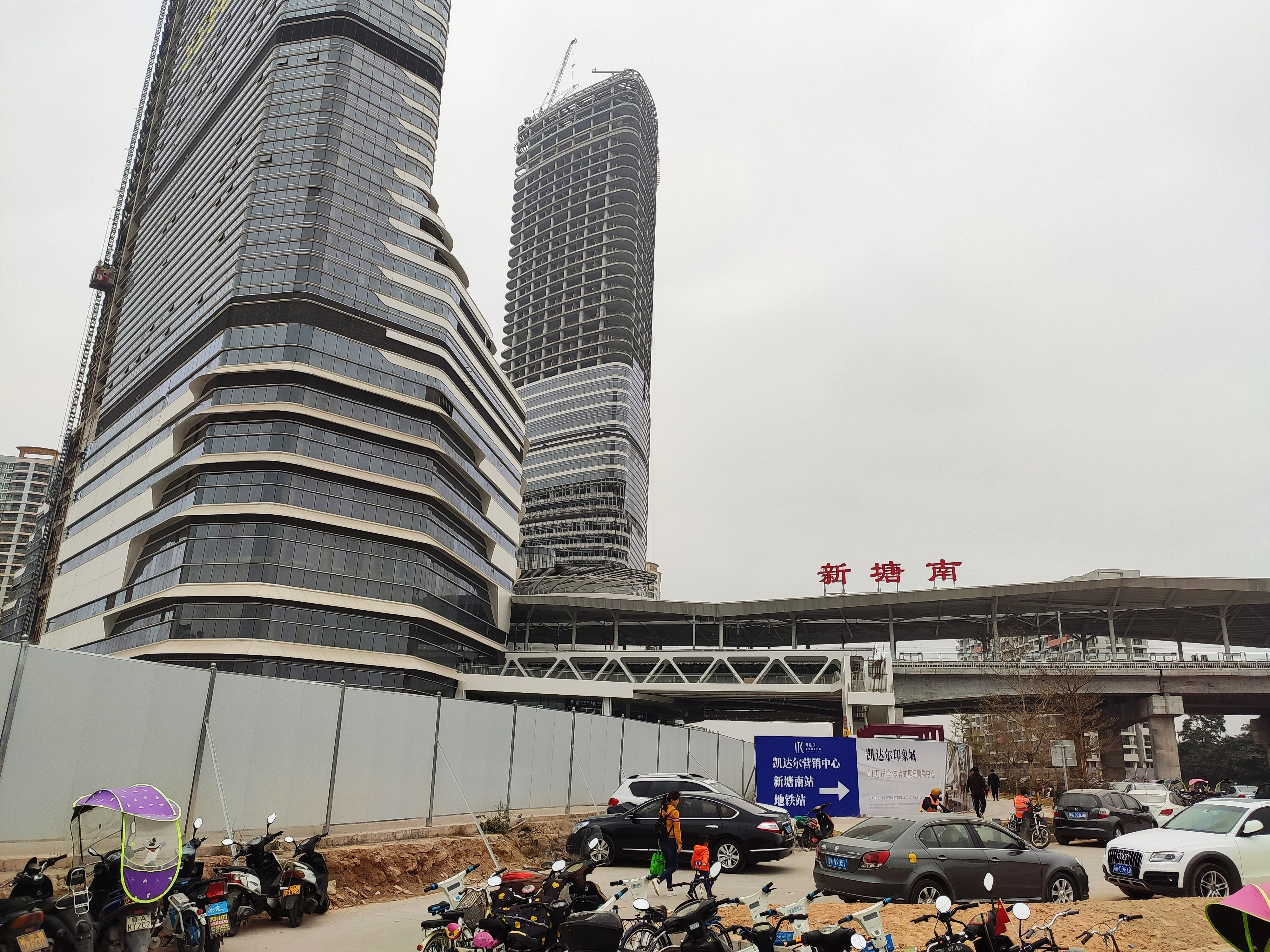 中文（中国大陆）: 新塘南站（20200102）